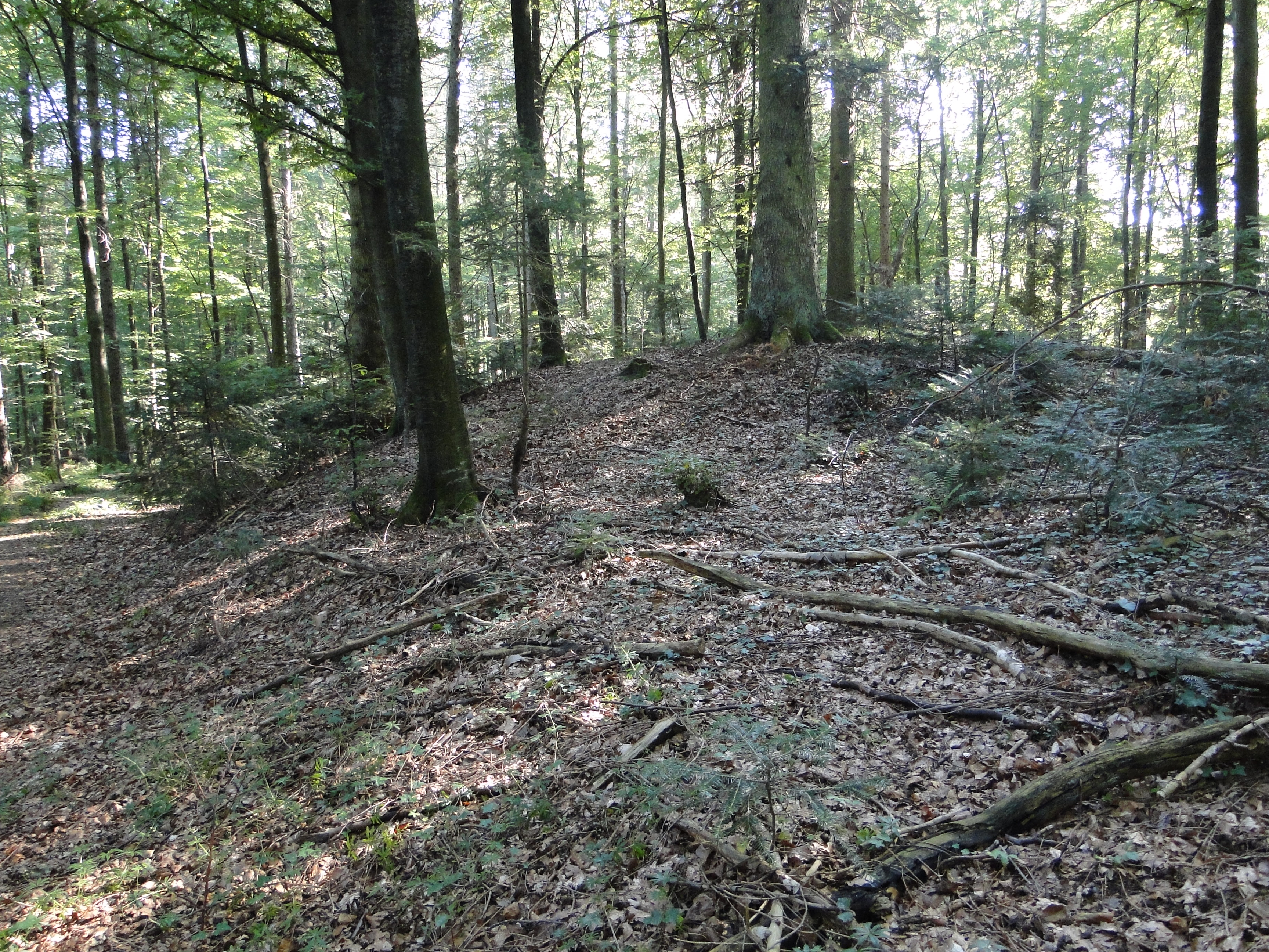 Grabhügel